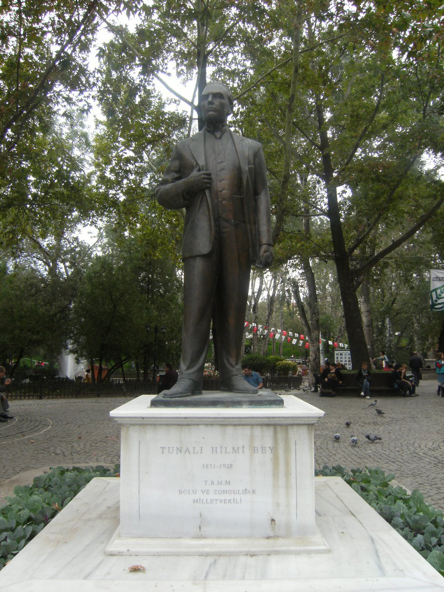 Ankara Kuğulu park içinde bulunan Tunalı Hilmi bey heykeli